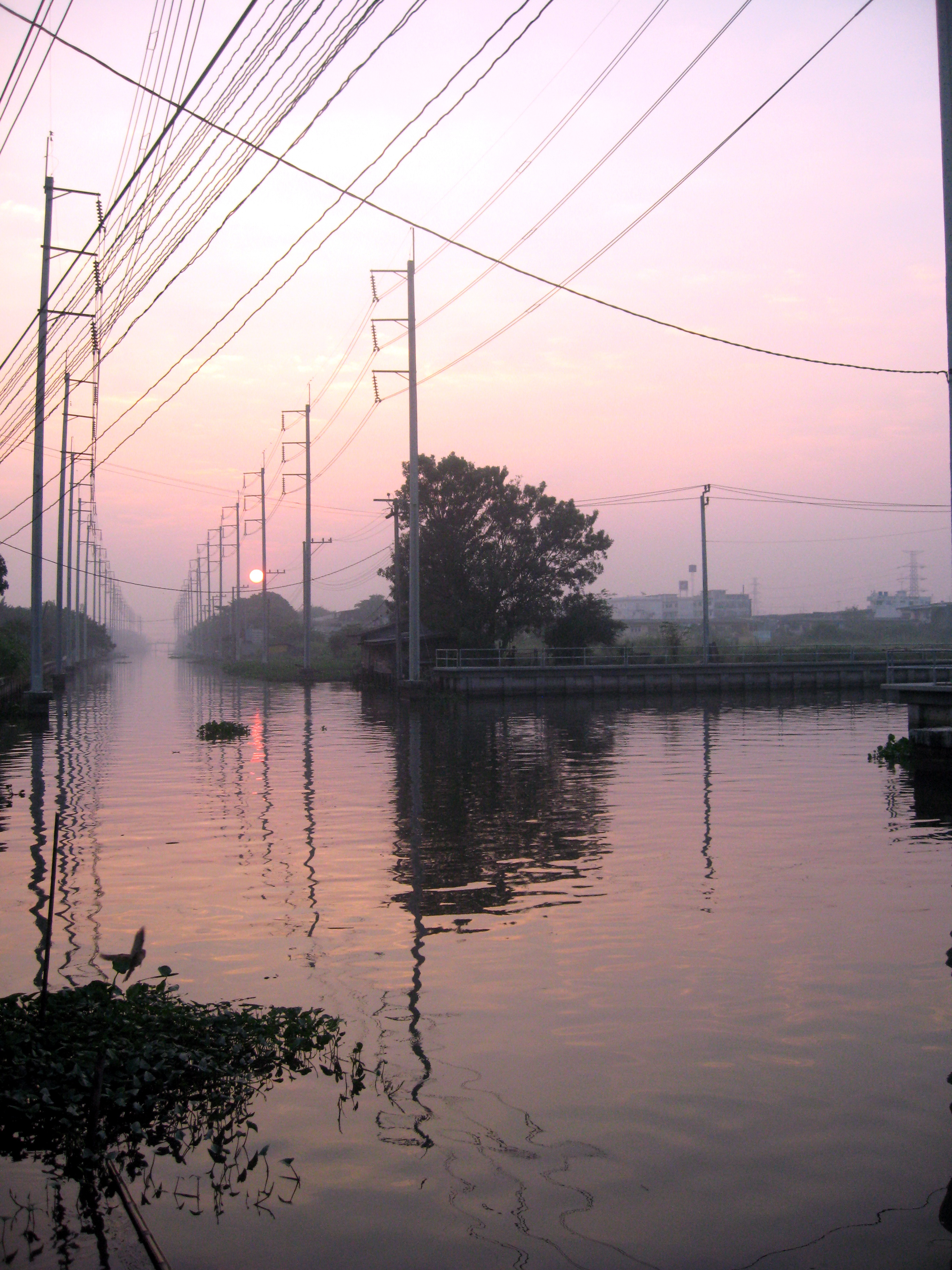 คลองหลังตลาดหัวตะเข้